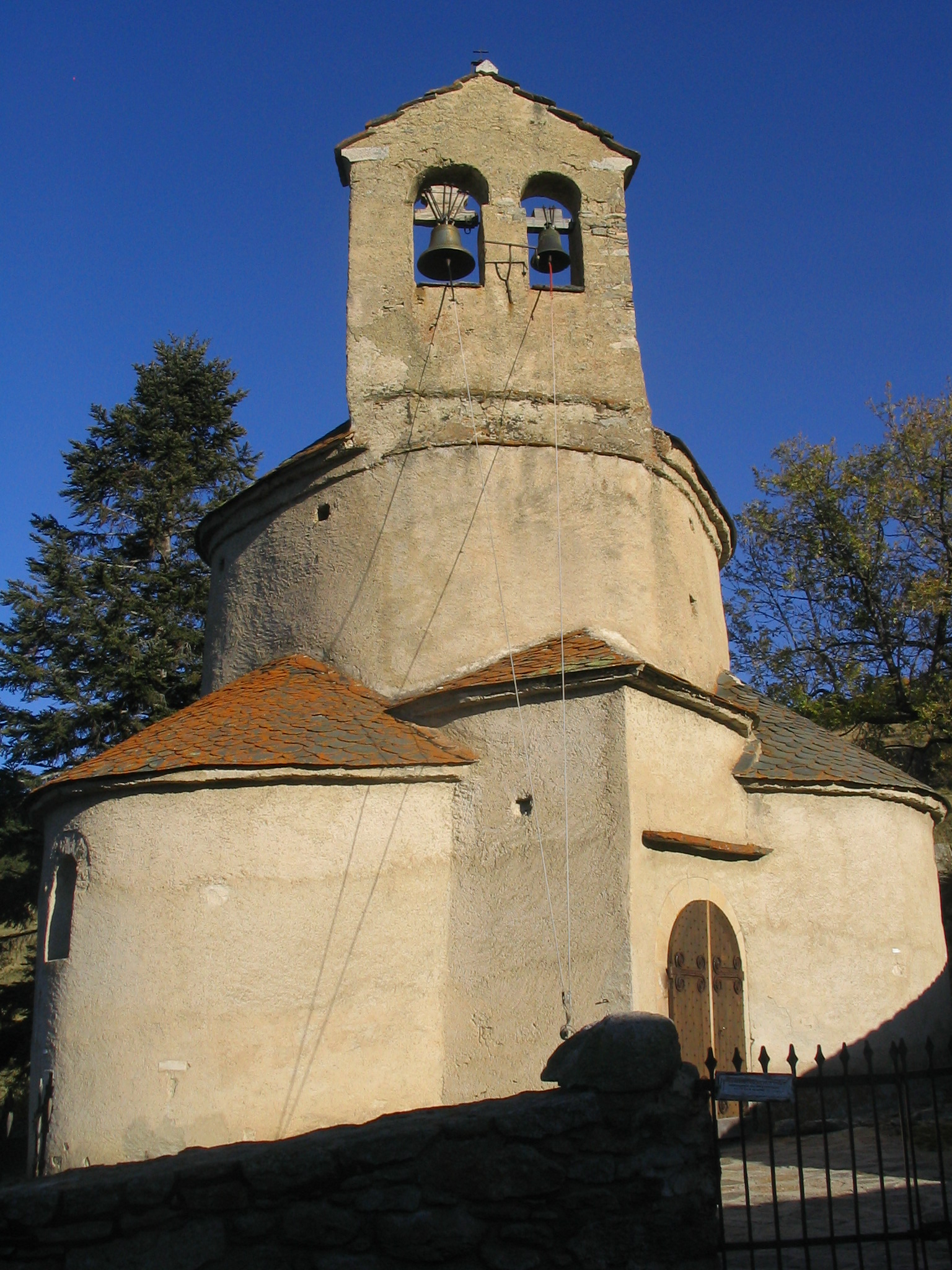 Església de planta rodona de Santa Maria de Planès